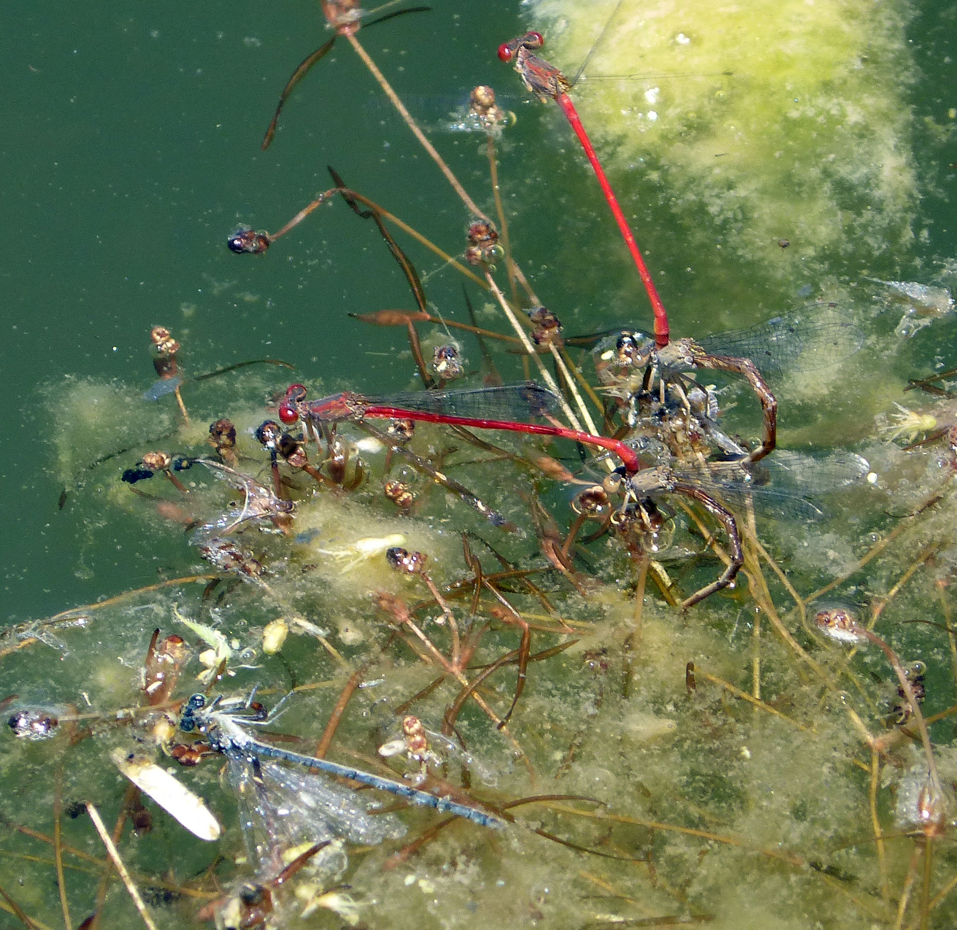 Desert Firetails - Telebasis salva. Mating